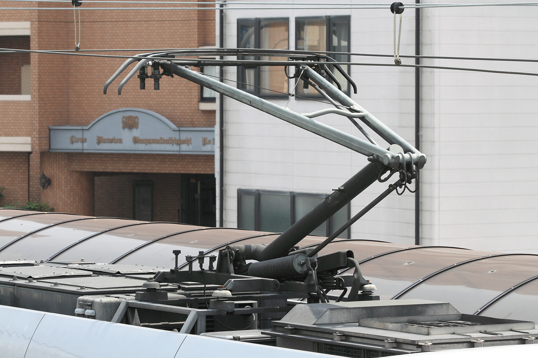 岡山電気軌道9200形 (9201) のパンタグラフ。